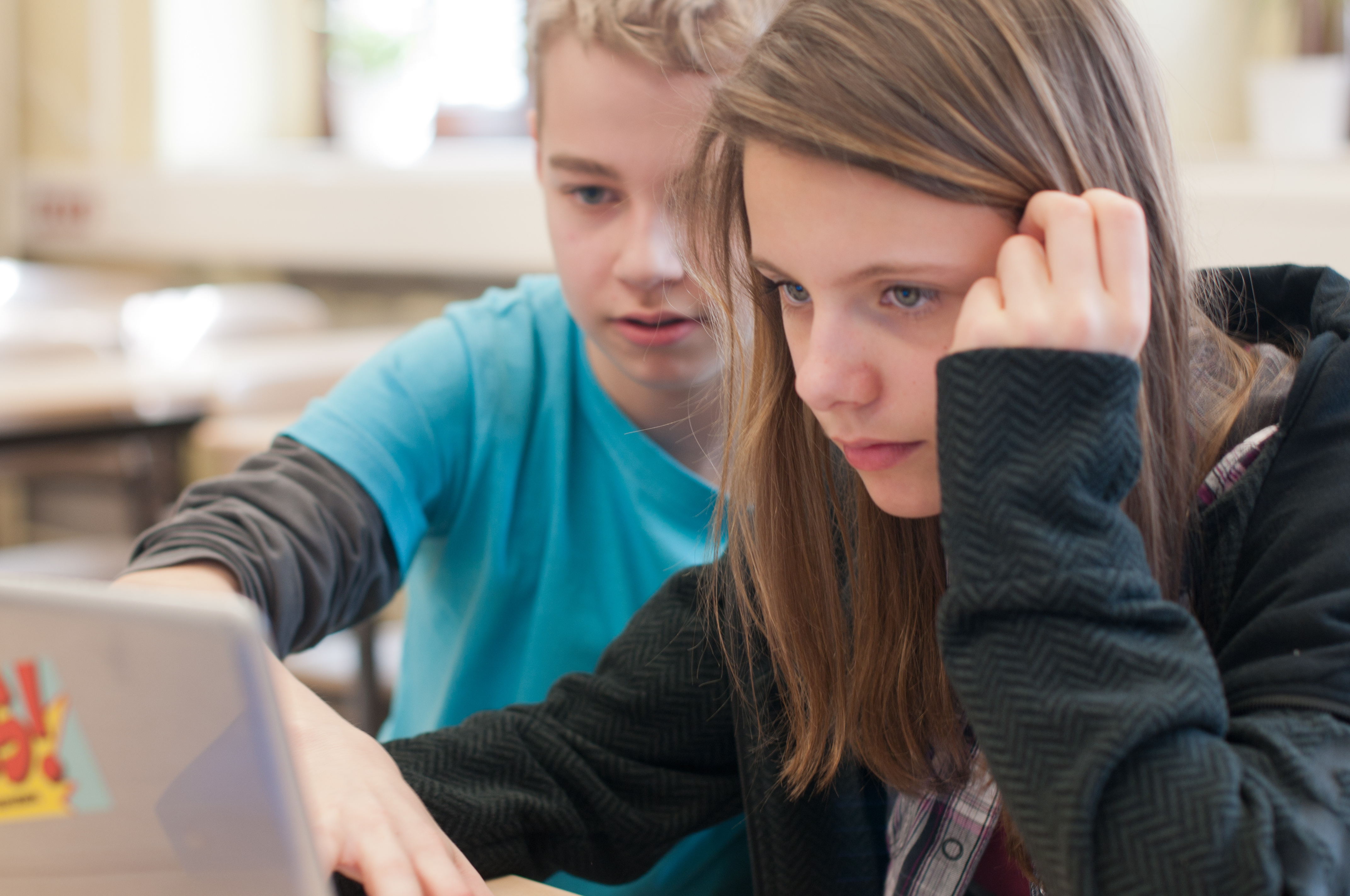 Pressetermin zum Einsatz von Wikis in der Ausbildung mit der Berliner Morgenpost in der [ Archenhold- Oberschule] Berlin- Treptoweine schriftliche Einverständniserklärung der Eltern zur Veröffentlichung der Fotos ihrer Kinder liegt vor.